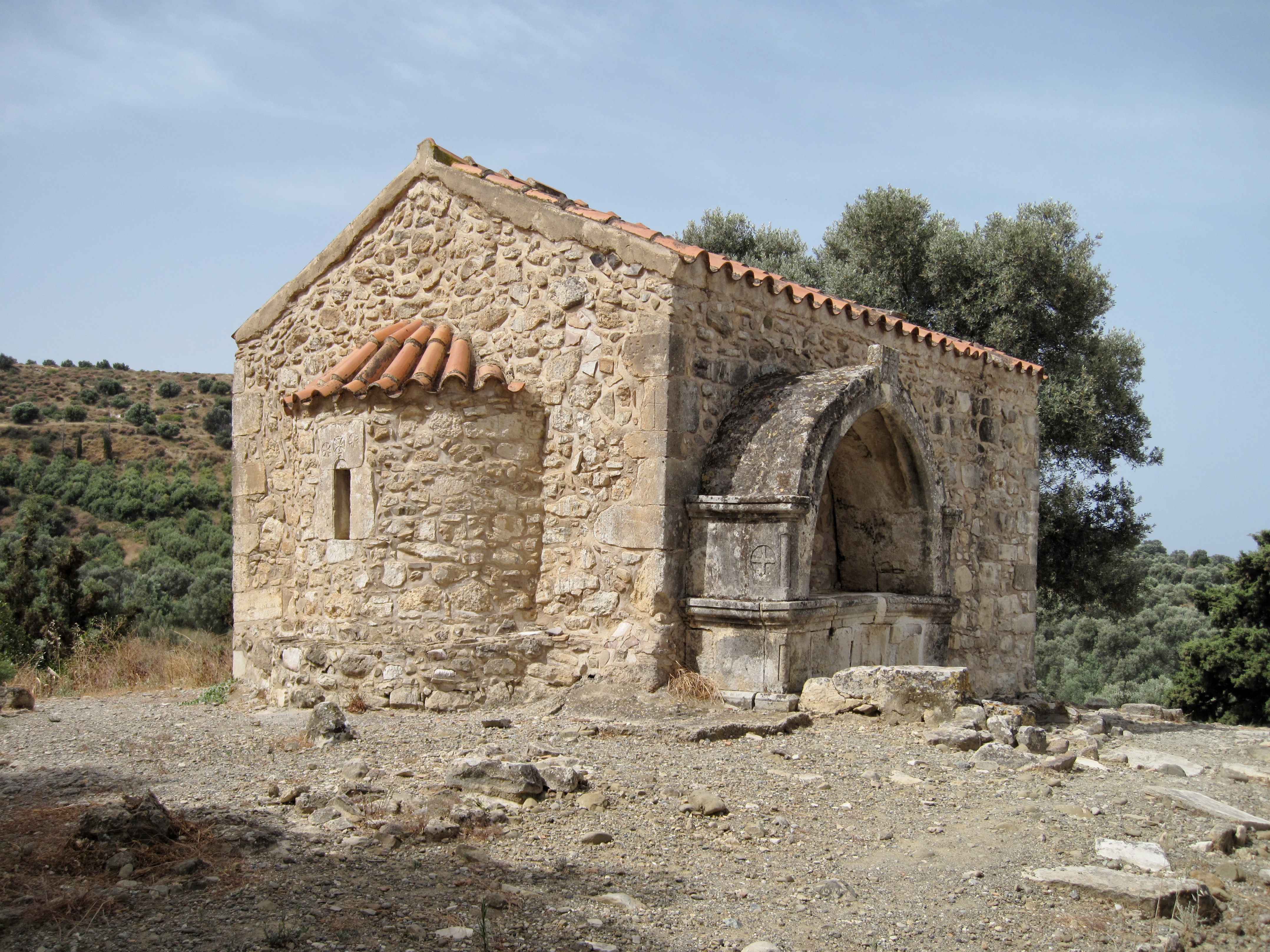 Kapelle Agios Georgios neben der Ausgrabungsstätte von Agia Triada in der Gemeinde Festos, Regionalbezirk Iraklio, Kreta, Griechenland